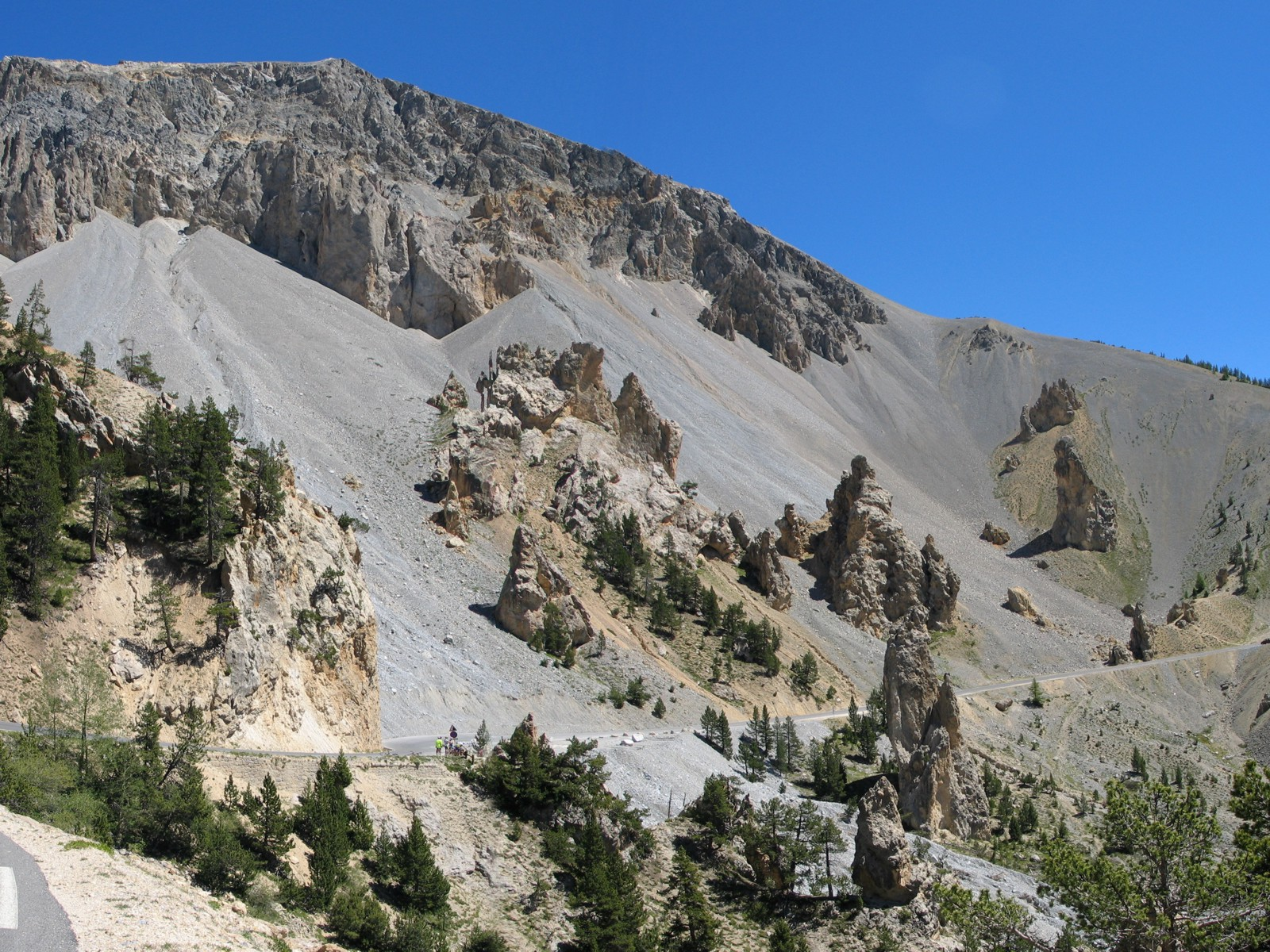 Casse Deserte an der Südseite des Izoardpasses